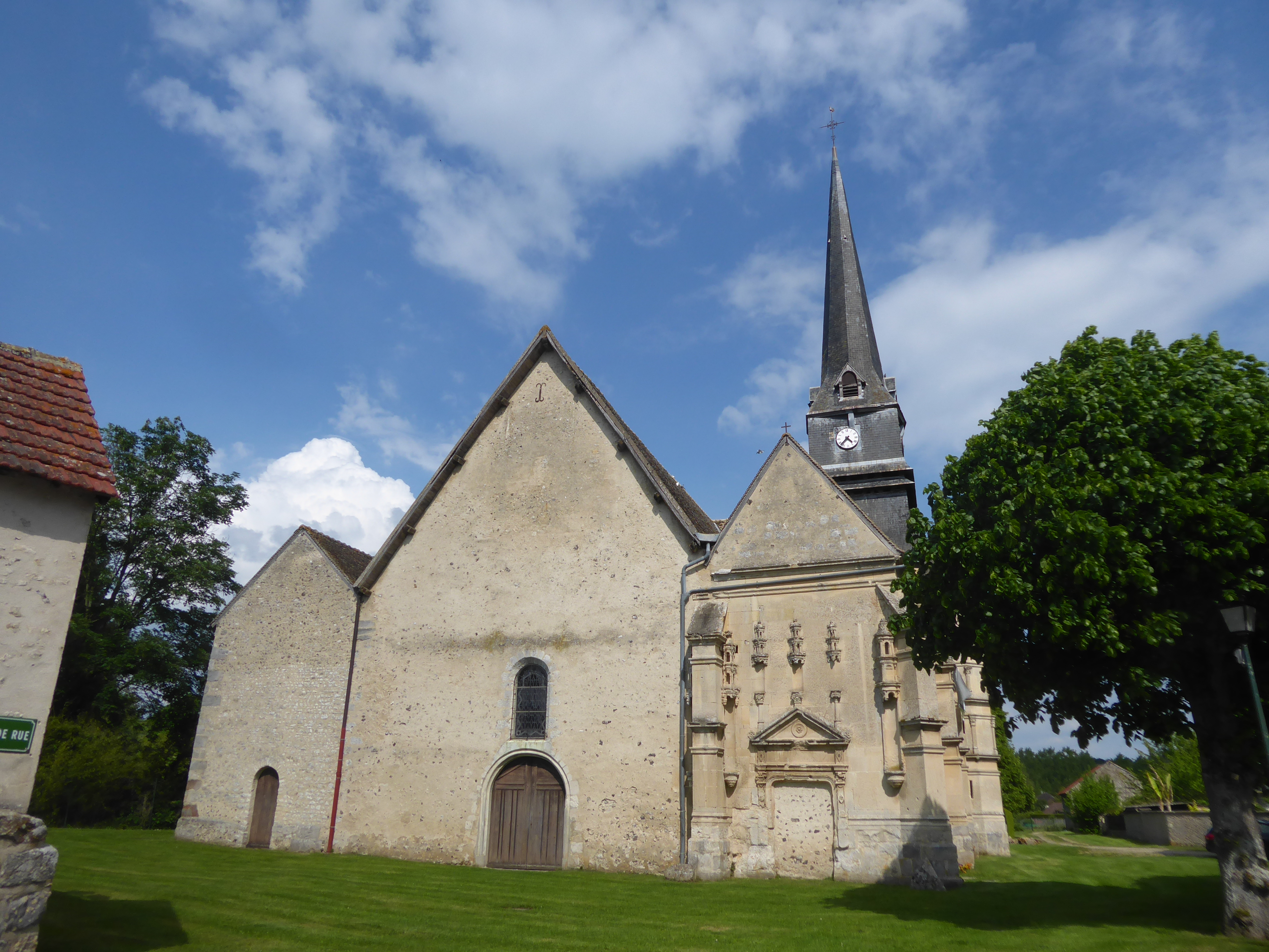 Eglise Saint-Martin - Rouvres - Eure-et-Loir - France